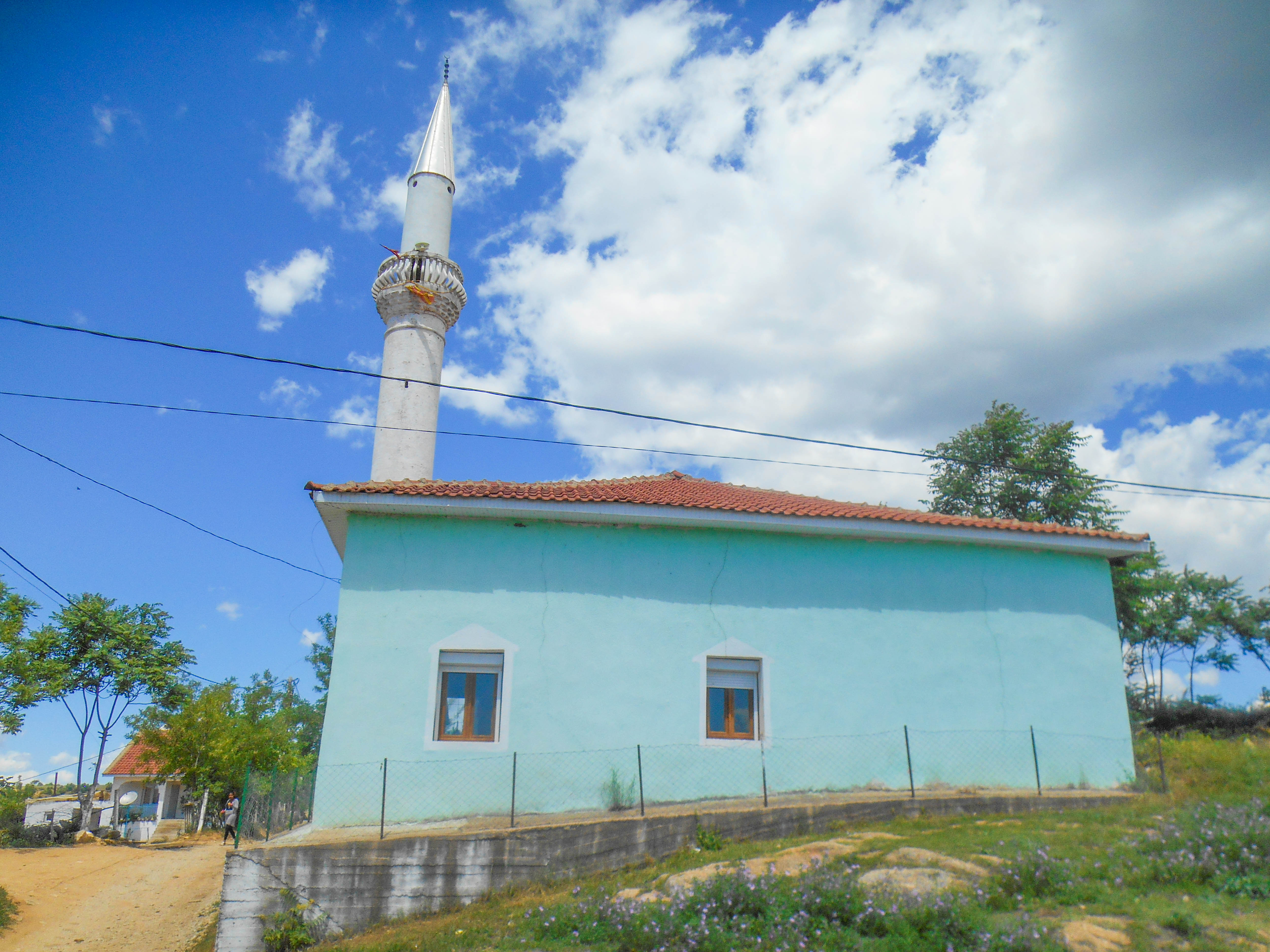 Џамија во Нова Маала